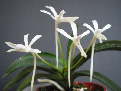 Vanda falcata